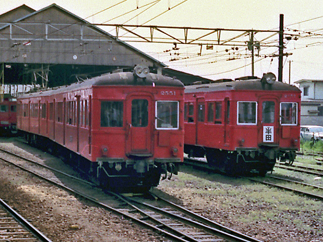 名鉄3550系電車